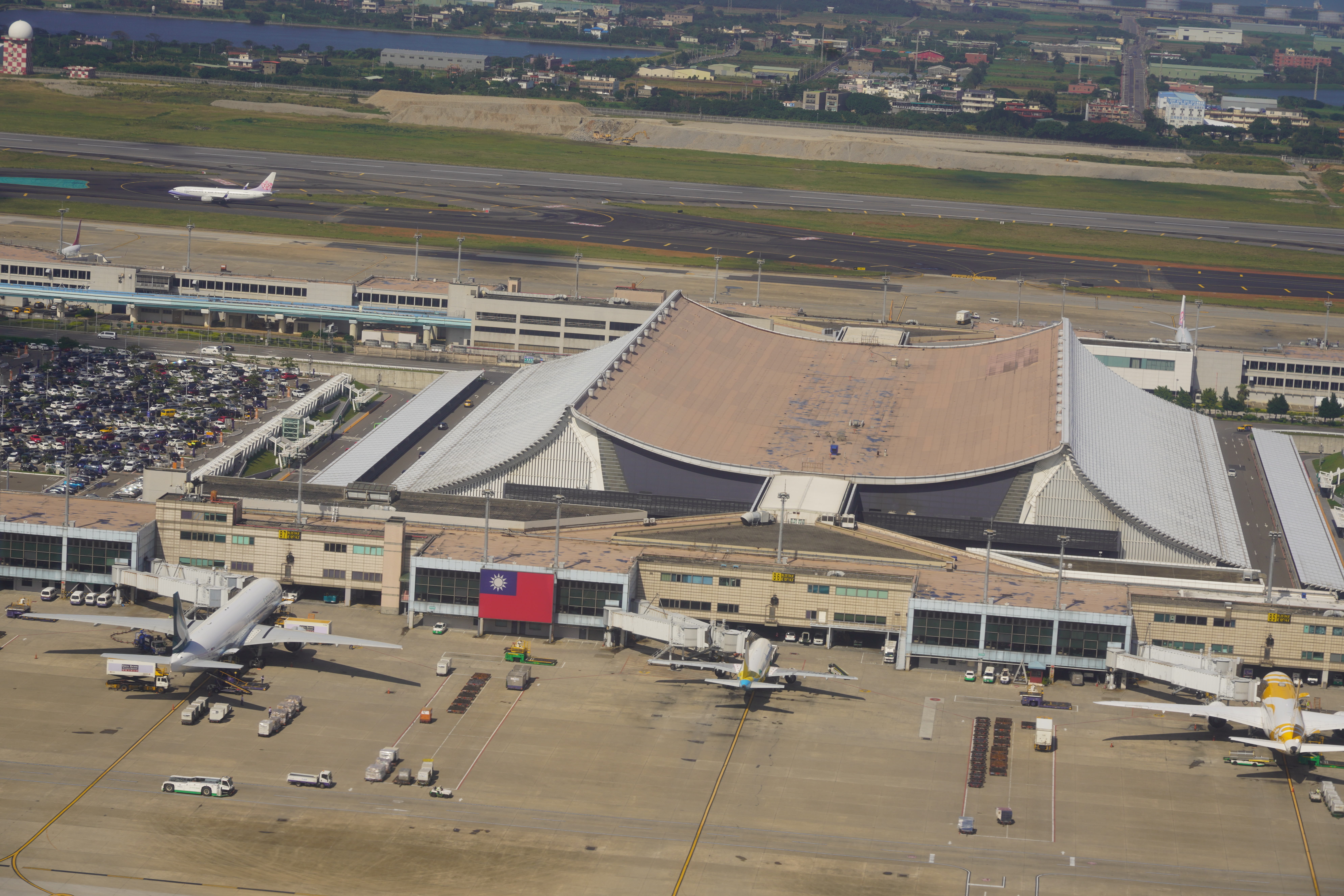 20181104_TPE-CTS_4237